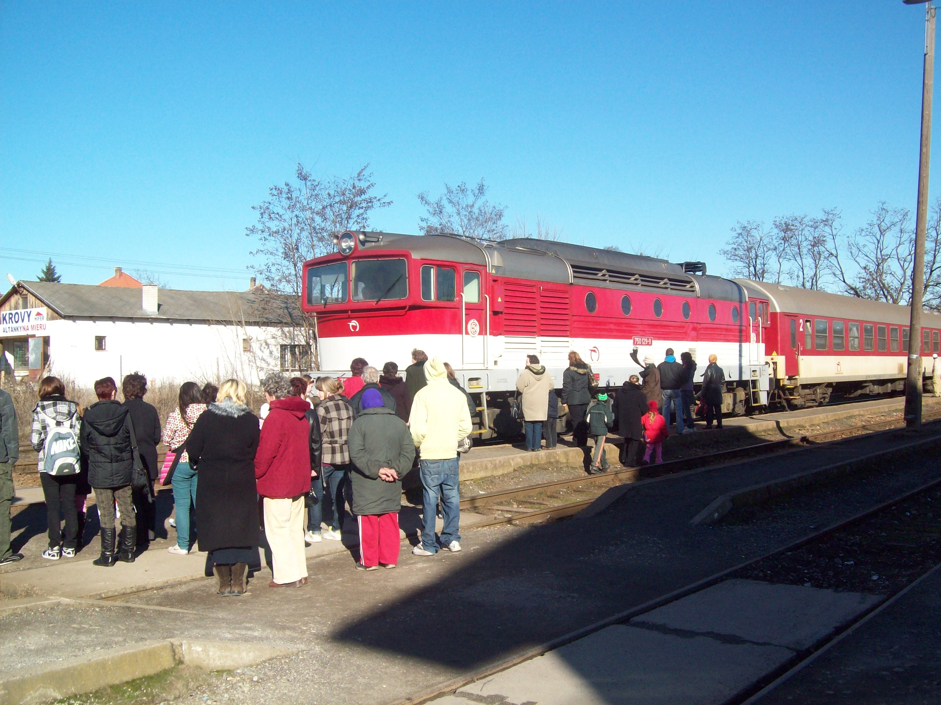 Železničná stanica Komjatice